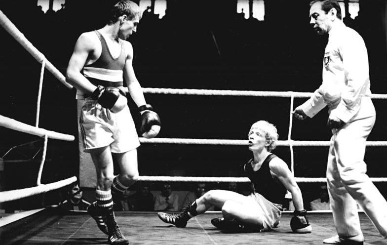 Janos Varadt, Klaus-Dieter Kirchstein ADN-ZB Lehmann 28.3.80 Halle: IX. Internationalaes Boxturnier um den Chemiepokal - Etwas verdutzt schaute Klaus-Dieter Kirchstein auf seinen Gegner Janos Varadt (UVR), Dritter der Junioren-Weltmeisterschaften 1979, gegen den er beim ersten Halbfinalkampf im Fliegengewicht schon in der ersten Runde zu Boden ging. Der Ungar gewann ungefährdet mit 5 : 0 Punkten.